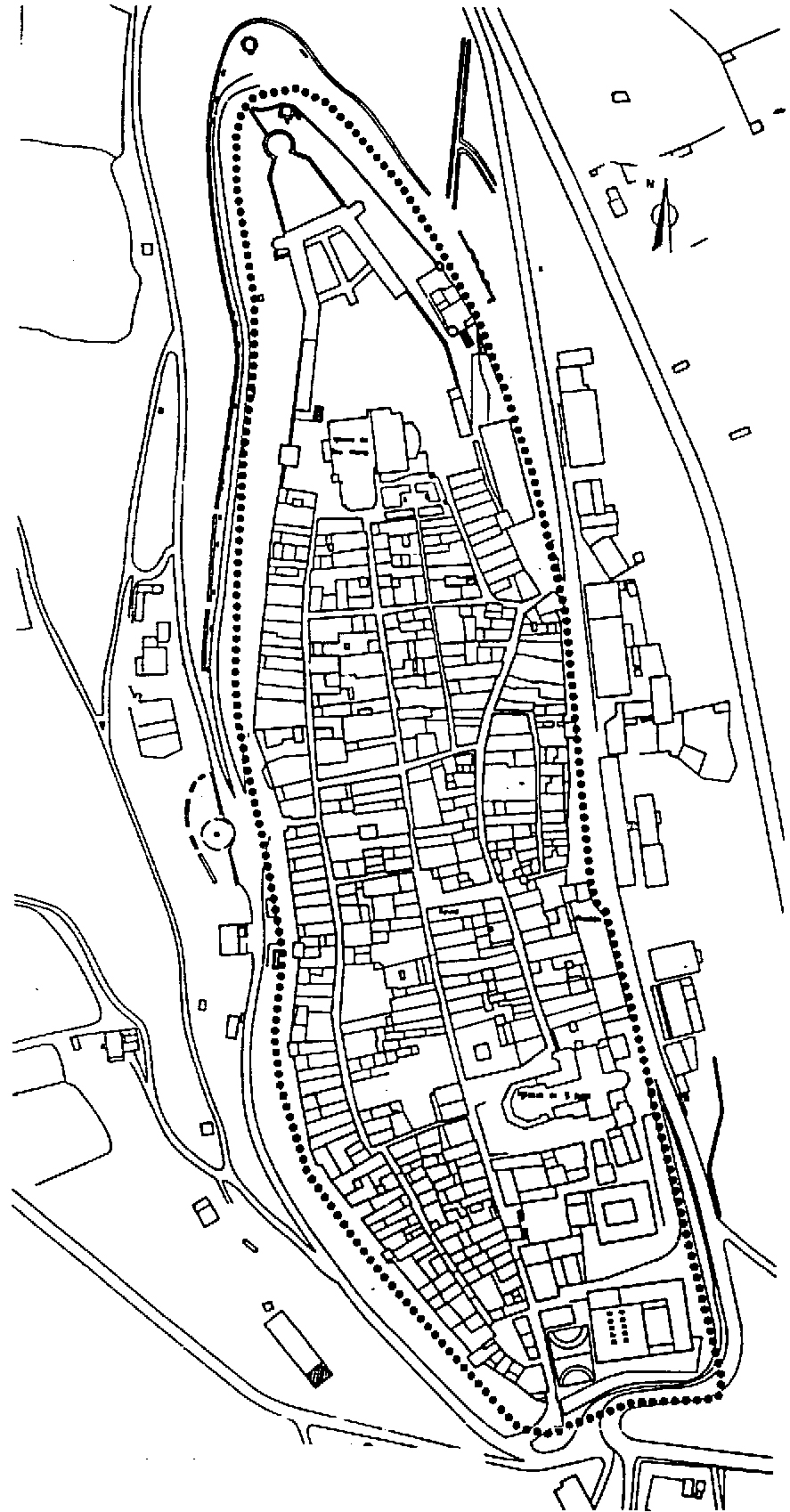 Guardiako hirigune historikoaren oinplanoa